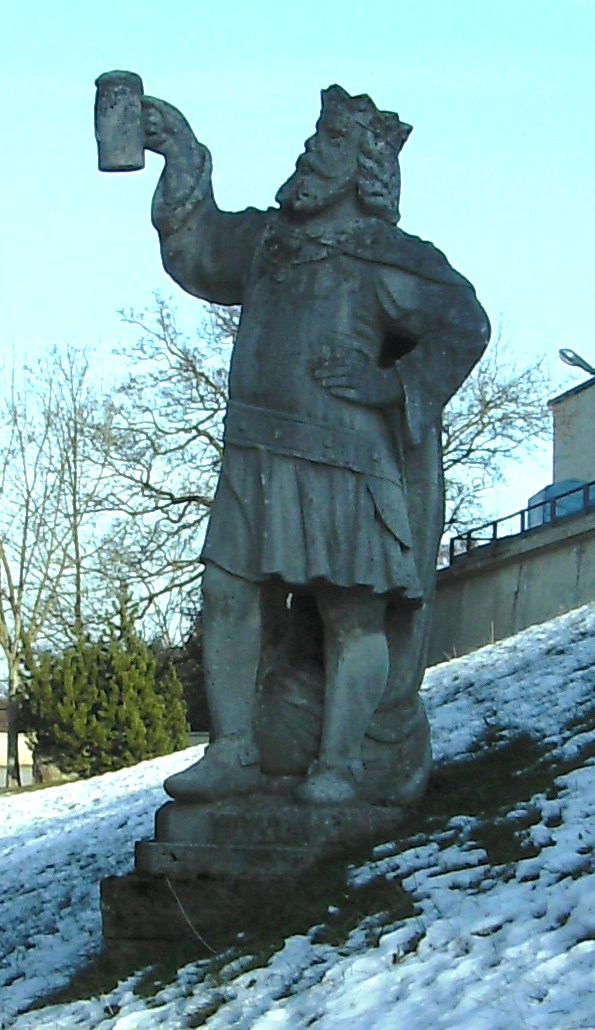 Gambrinus-Figur. Standort: ehemal. Brauerei Becker, St. Ingbert